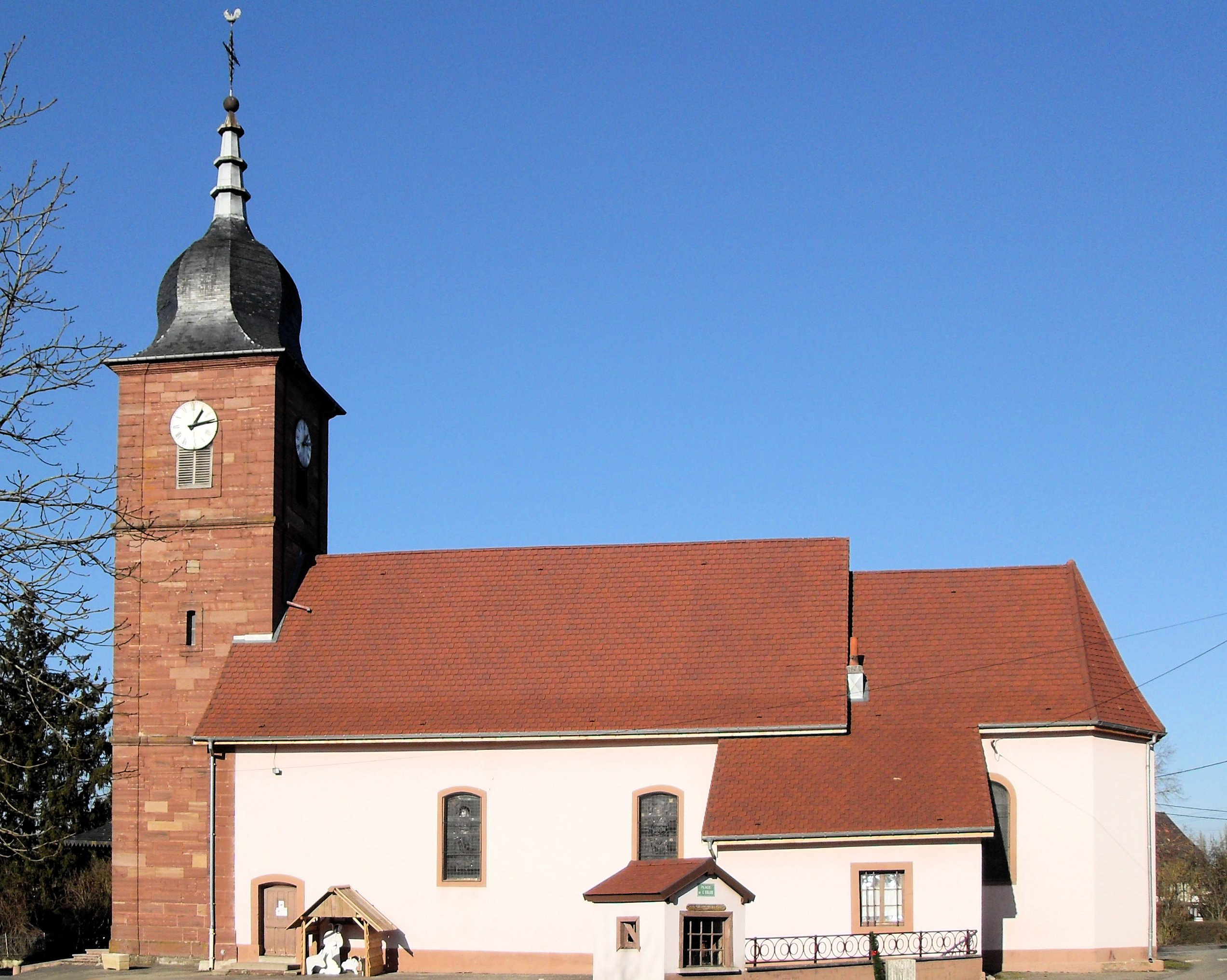 L'église Saint-Blaise à Reppe